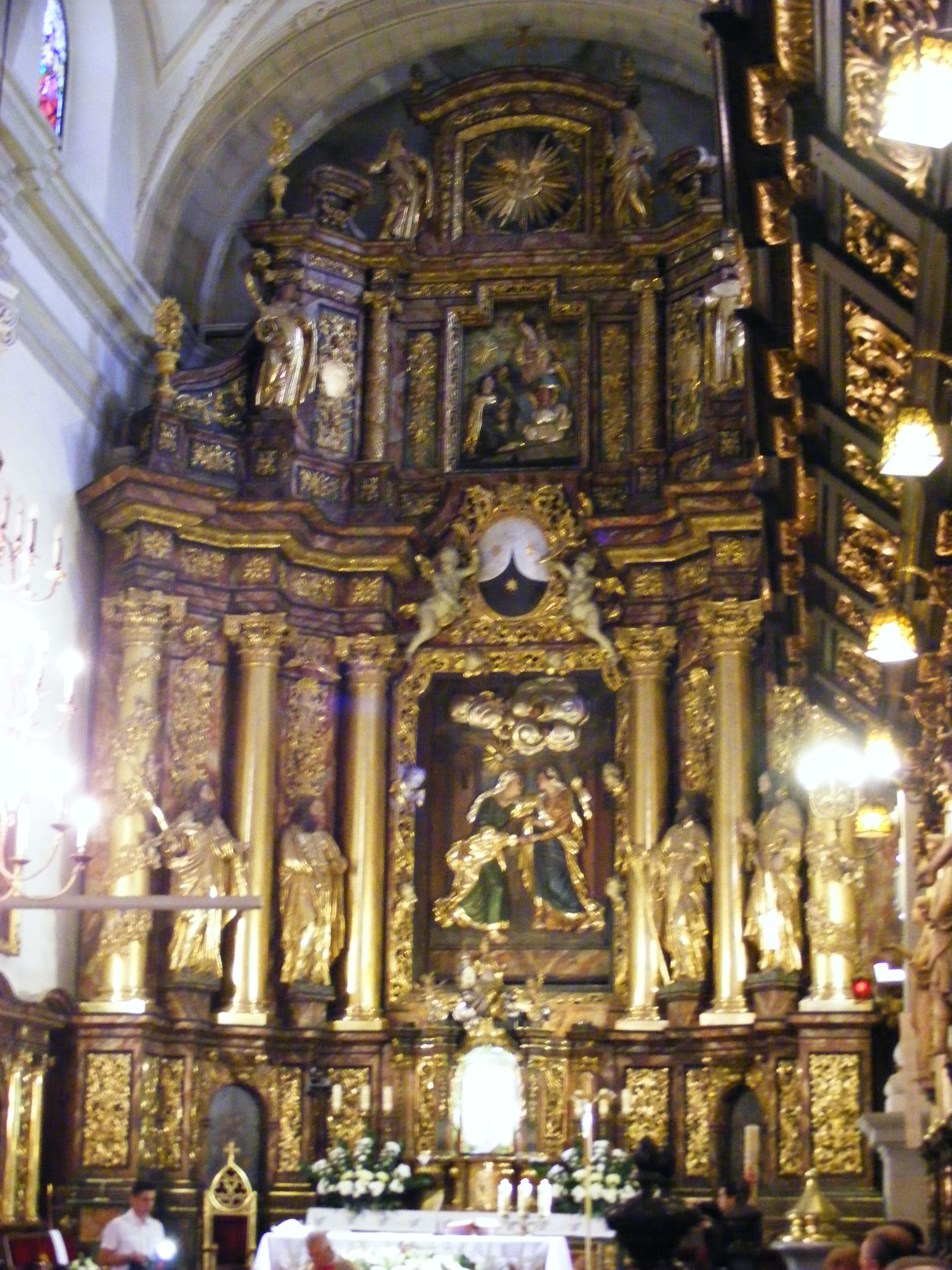 Kościół klasztorny karmelitów trzewiczkowych pw Nawiedzenia Najświętszej Maryi Panny w Krakowie, "Na Piasku".